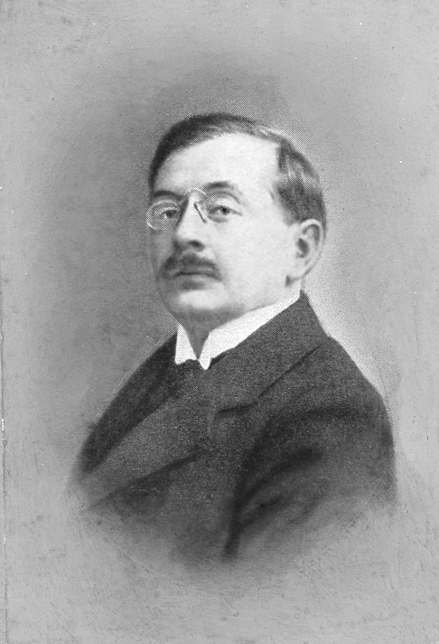 Adolf Nowaczyński